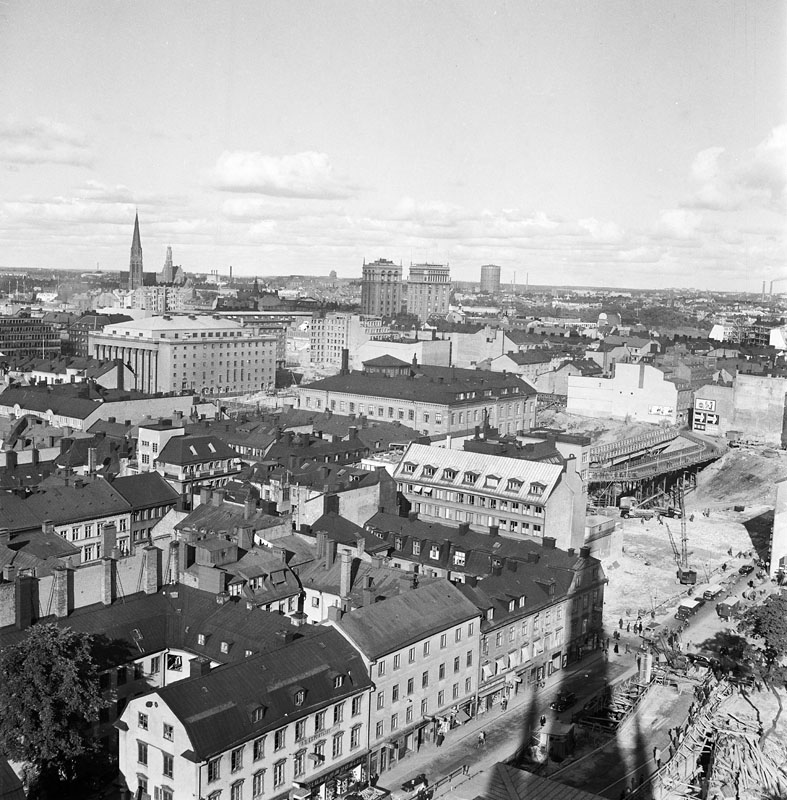 Utsikt över Klarakvarteren i riktning mot Konstfackskolan, Konserthuset och Kungstornen. I förgrunden Klarabergsgatan och kvarteret Gripen. Rivningar kring blivande Sergels Torg